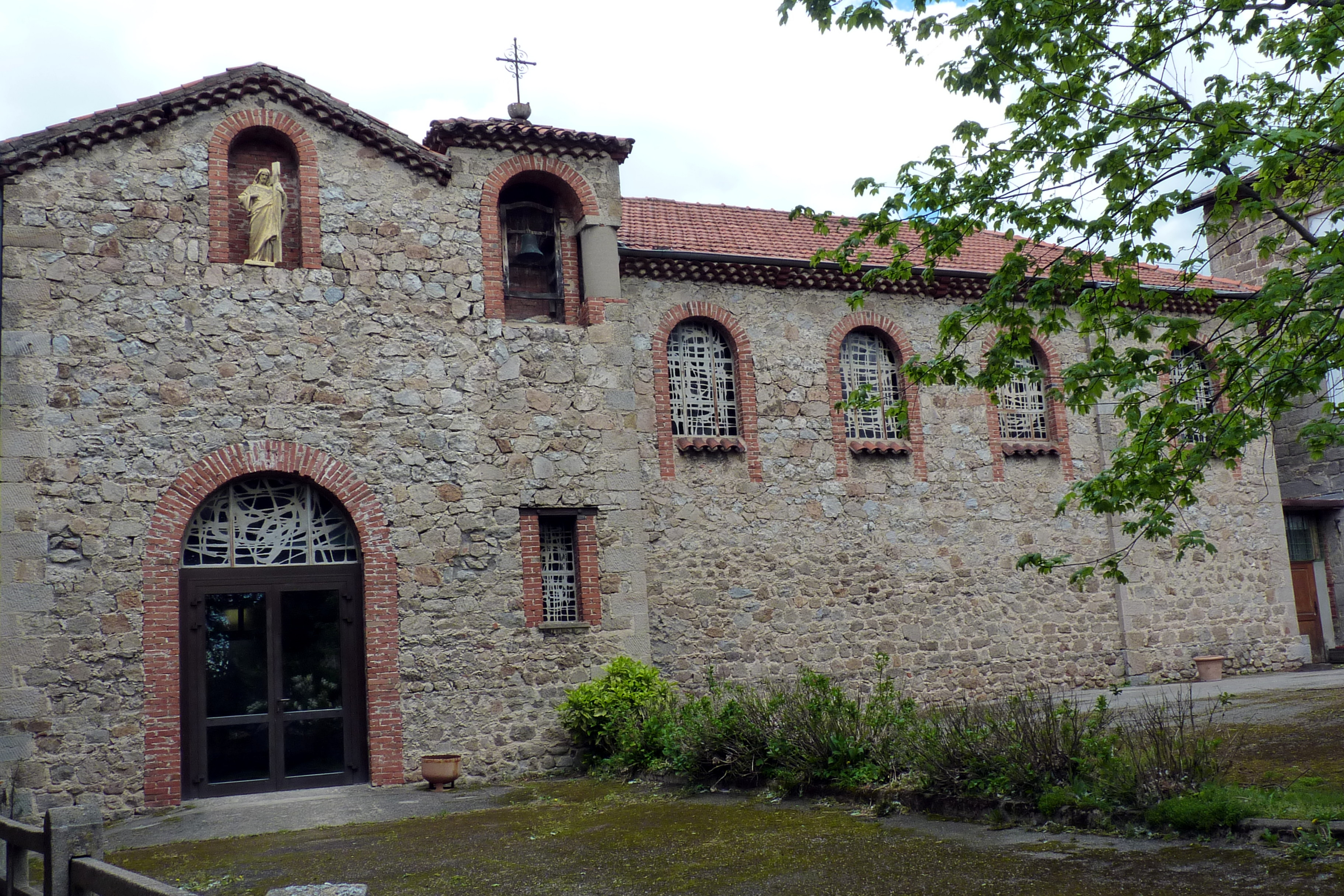 La Chapelle Claire-Joie a été construite en 1930 grâce à une souscription auprès des habitants.